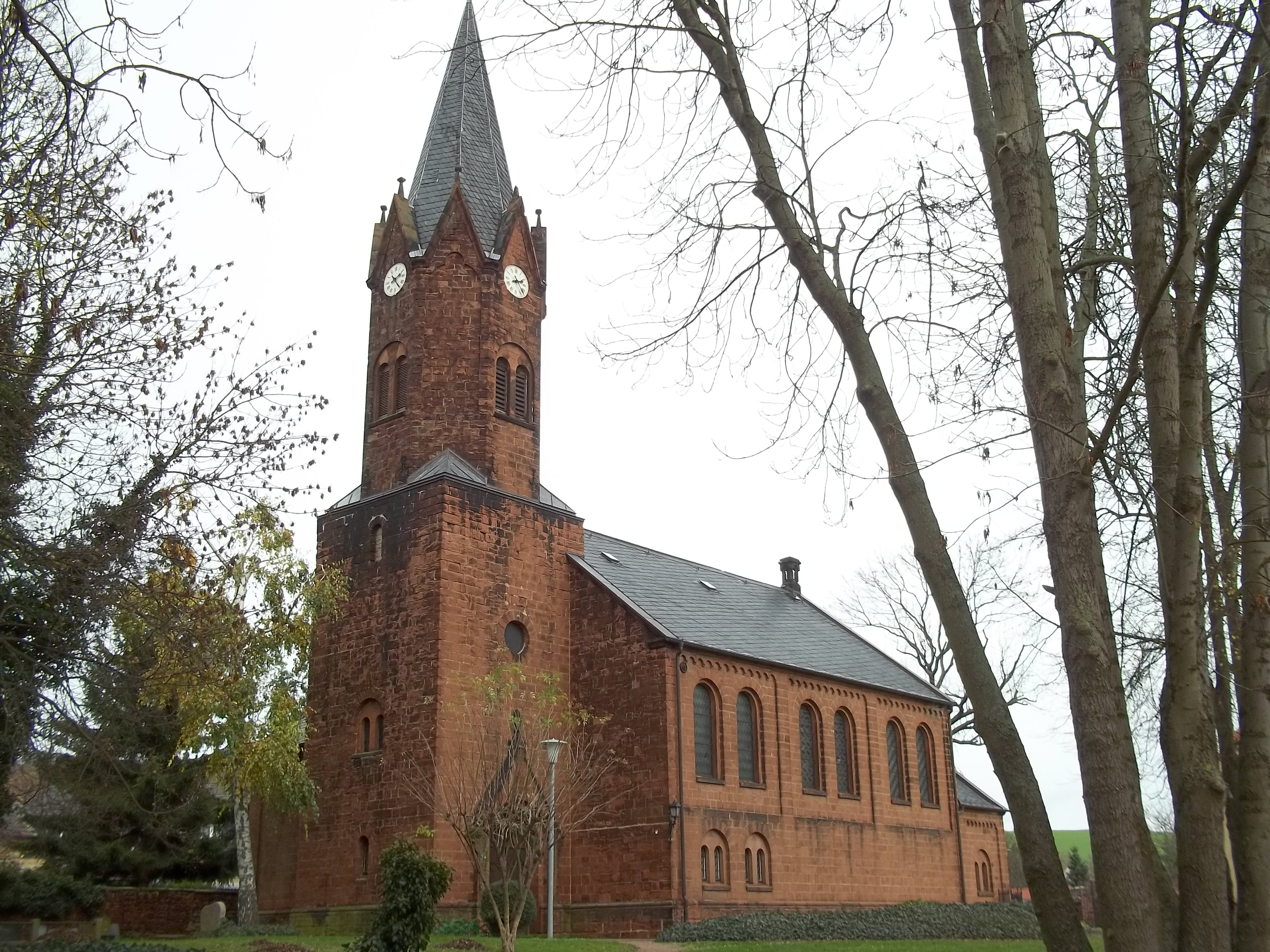 Autobahnkirche Rothenschirmbach